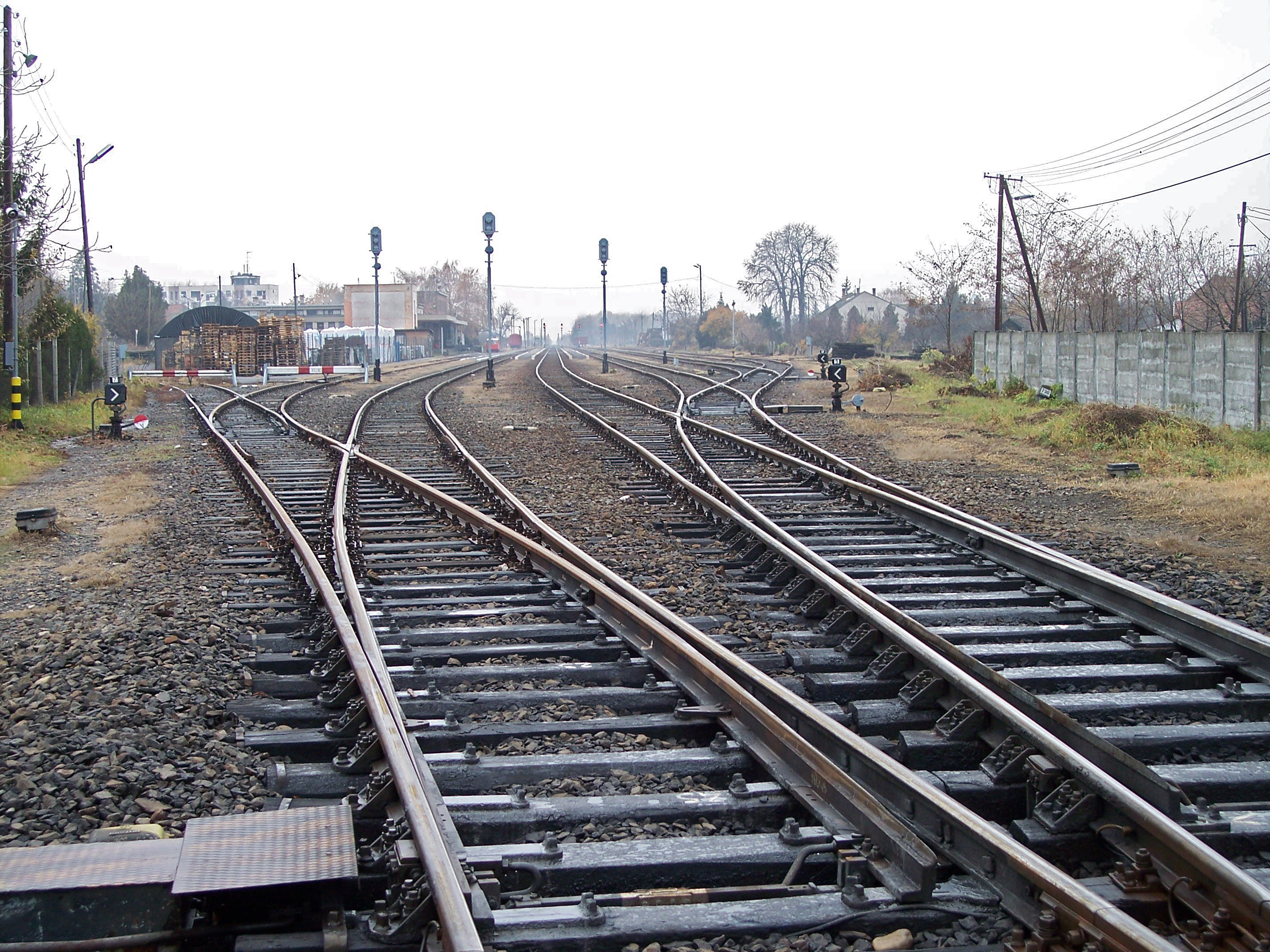 Railroad in Gyula (Hungary)